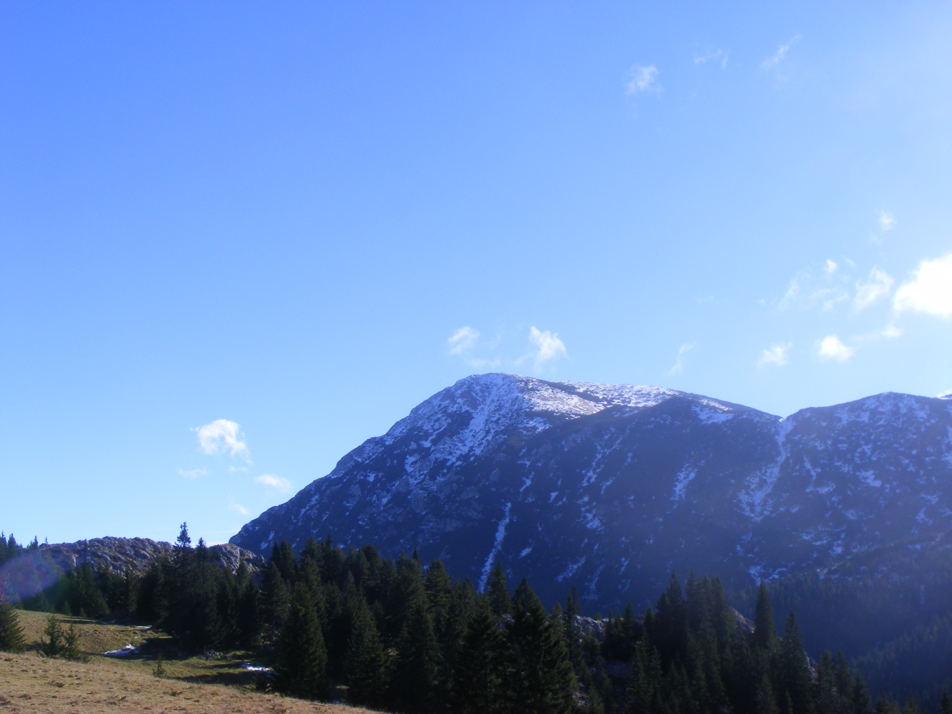 Pamje e Rusollisë nga ana veriore gjegjësisht nga Kulla